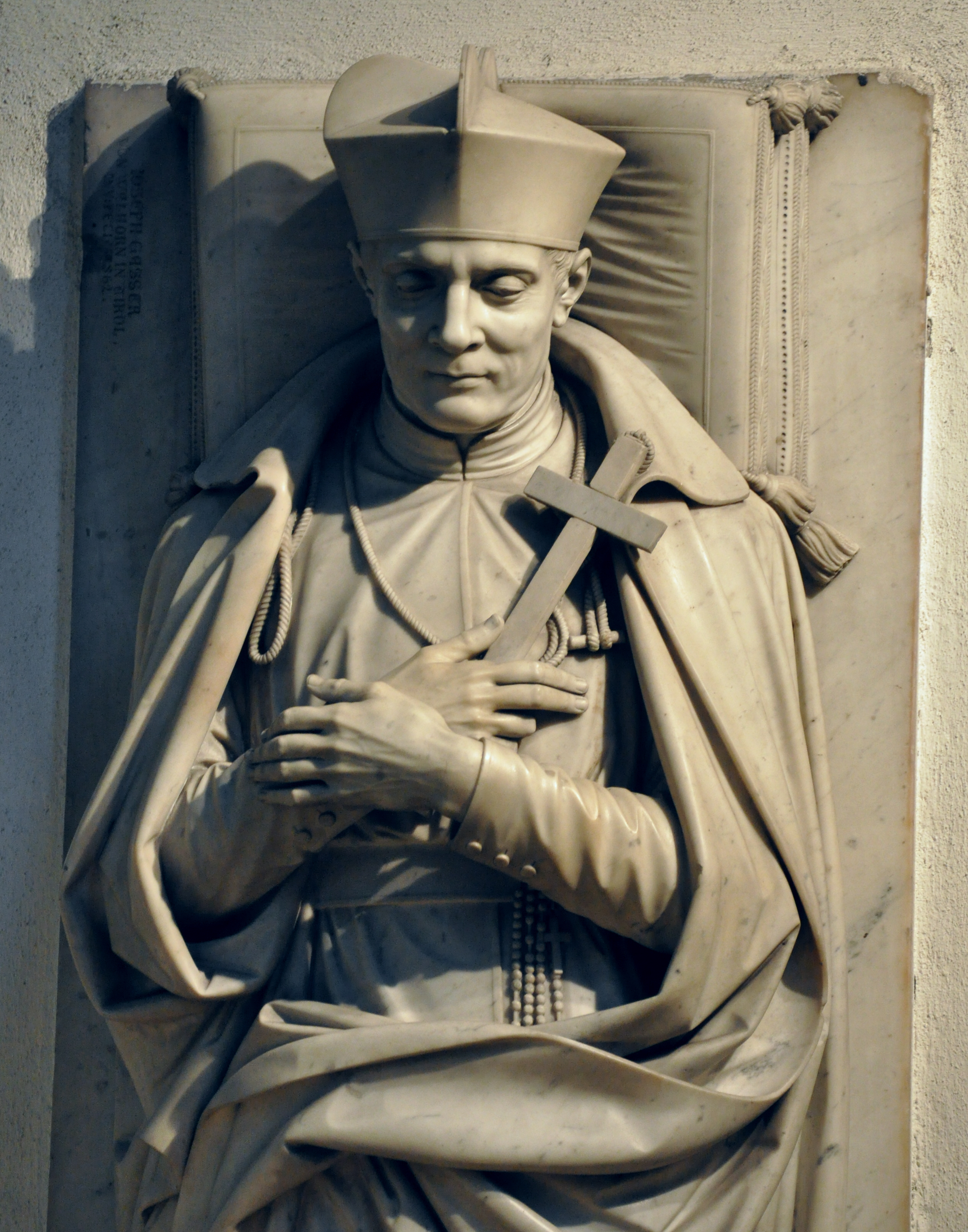 Wien, Kirche Maria am Gestade, Relief des hl. Klemens Maria Hofbauer (ehem. Grabplatte), Detail